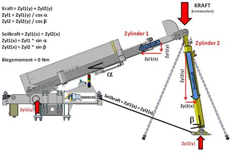 Kraftdreieck